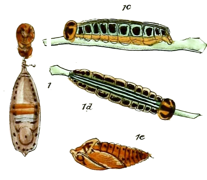 Pola ataphus = Bibasis oedipodea ataphus (larvae and pupae)